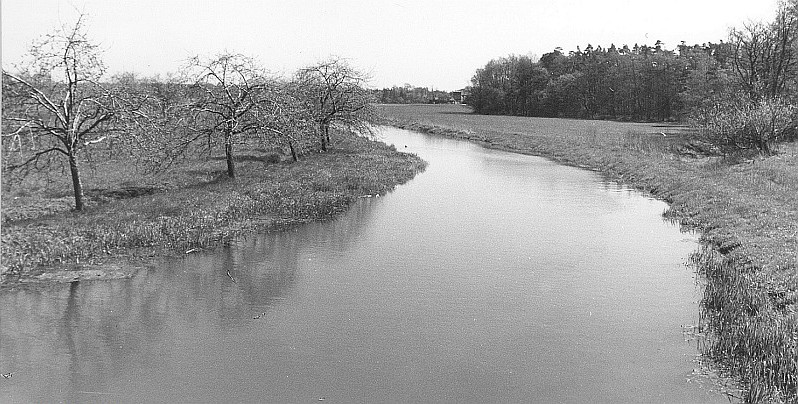 Original image description from the Deutsche Fotothek Zweibrücken. Schöps mit Blick auf die Mühle